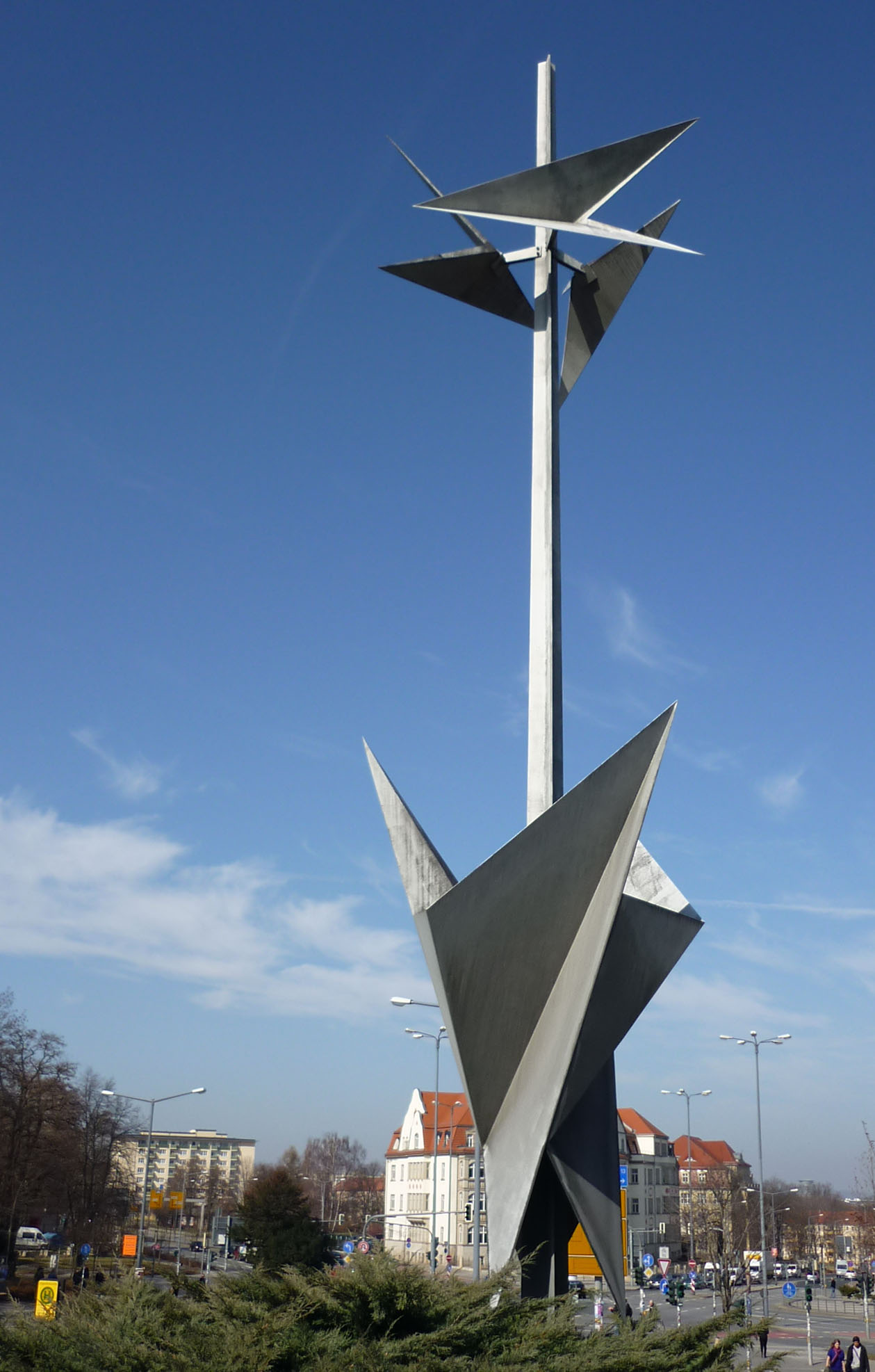 Metallplastik „Mast mit zwei Faltungszonen“ von Hermann Glöckner am Fritz-Foerster-Platz in Dresden